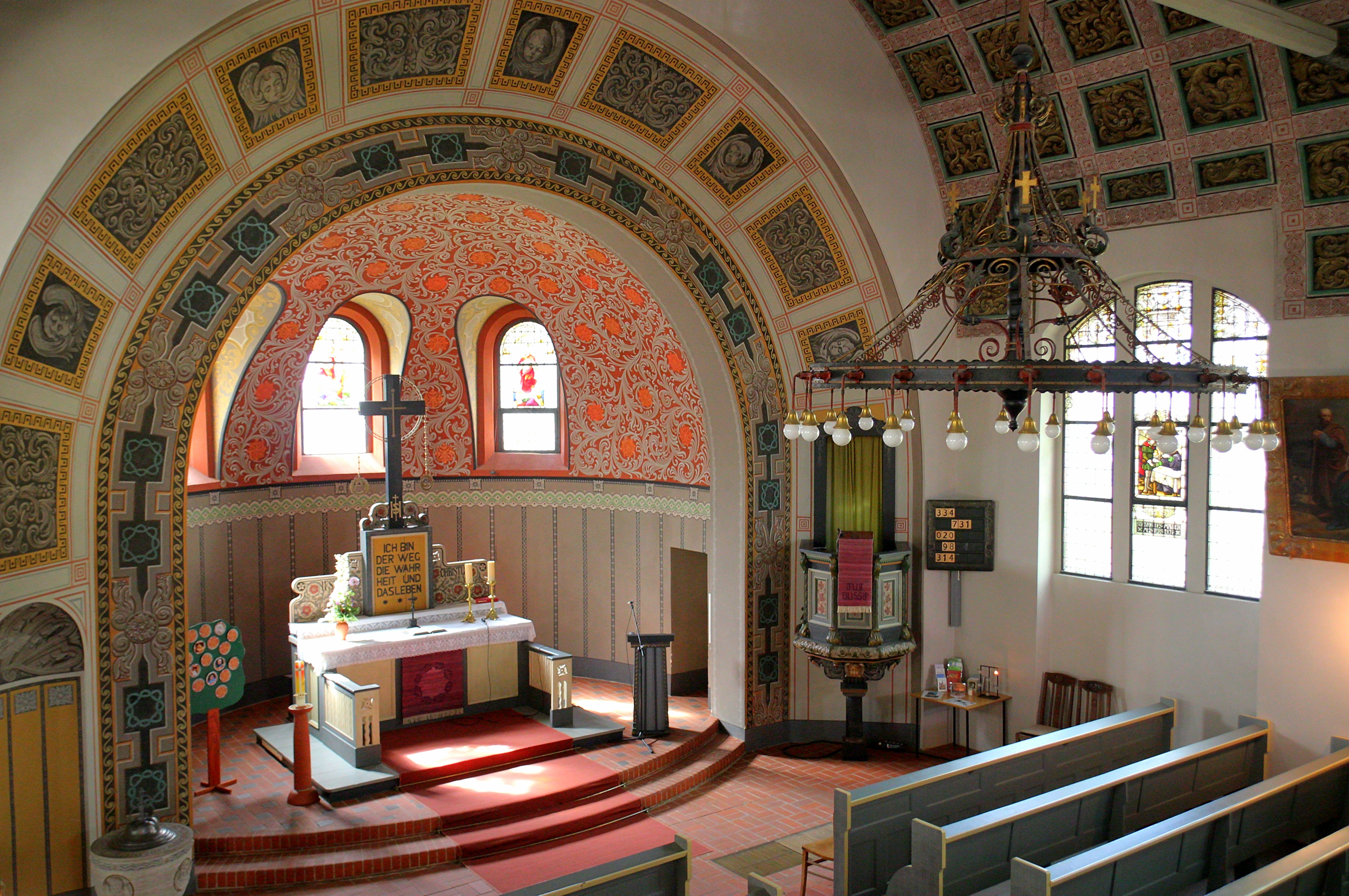 Dorfkirche Hohen Neuendorf Apsis und Chor